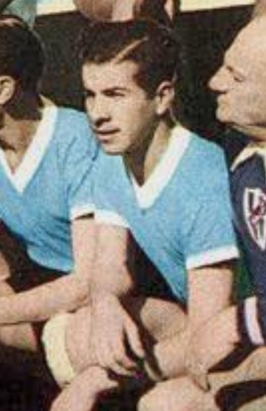 Rubén Morán en la Copa del Mundo de 1950